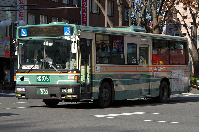 Seibu Bus 西武バス